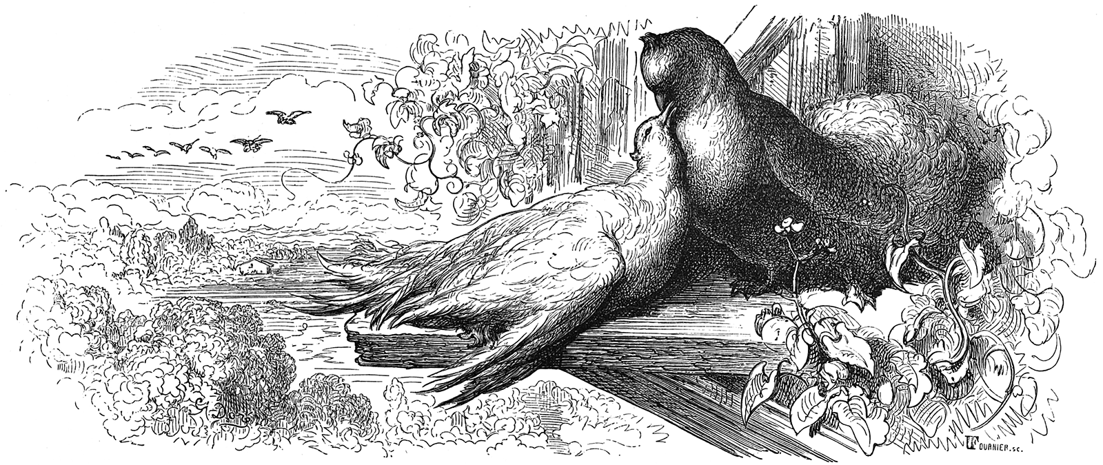 grafika z książki PL Bajki, Jean de La Fontaine, nakładem i drukiem Jana Noskowskiego, Warszawa 1876